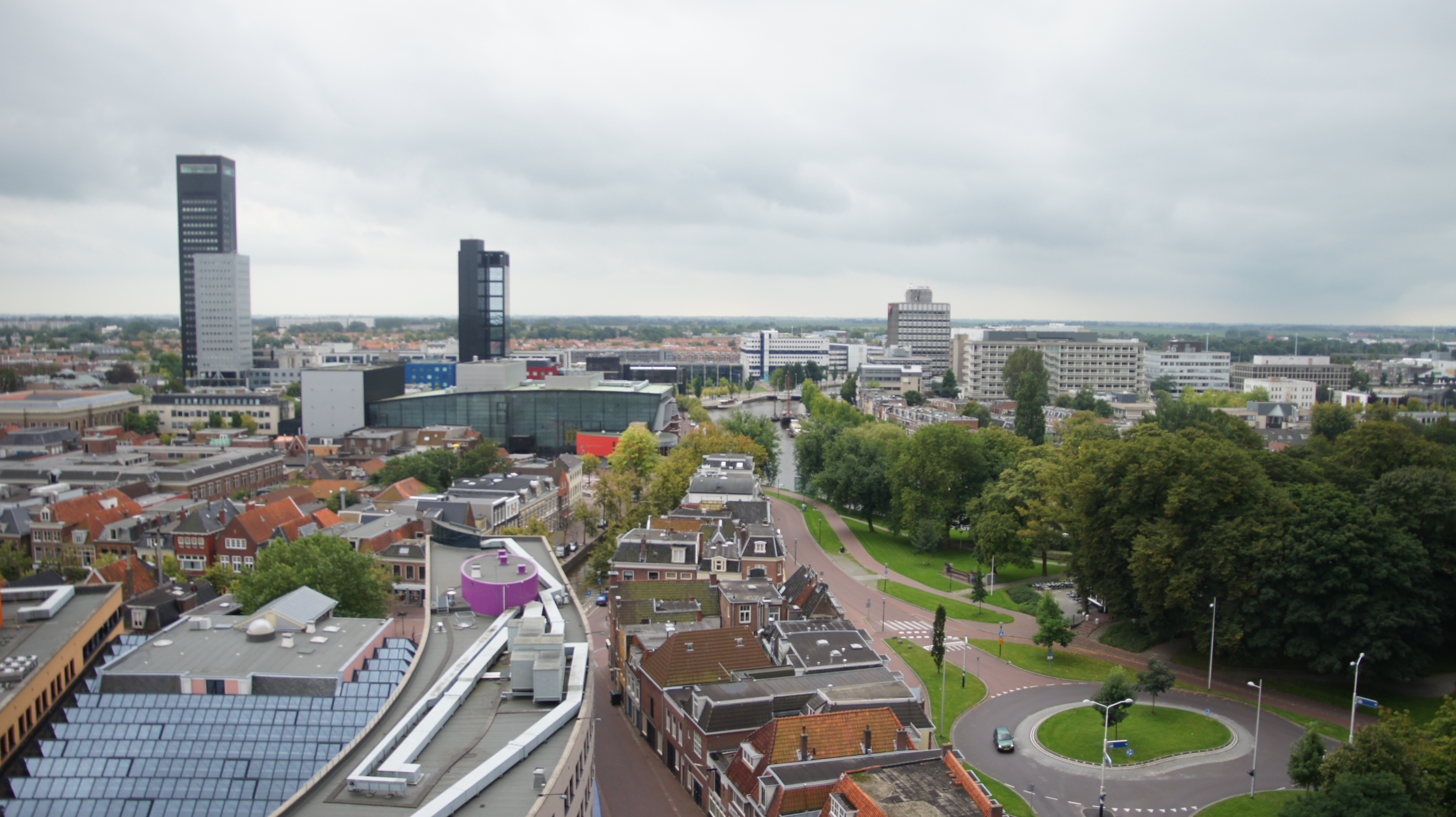 Zicht op Leeuwarden vanaf de Oldehove, met links de Achmeatoren